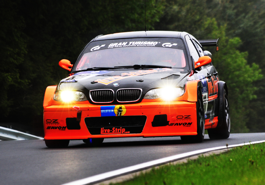 Startnummer 80 beim 24h-Rennen auf dem Nürburgring.